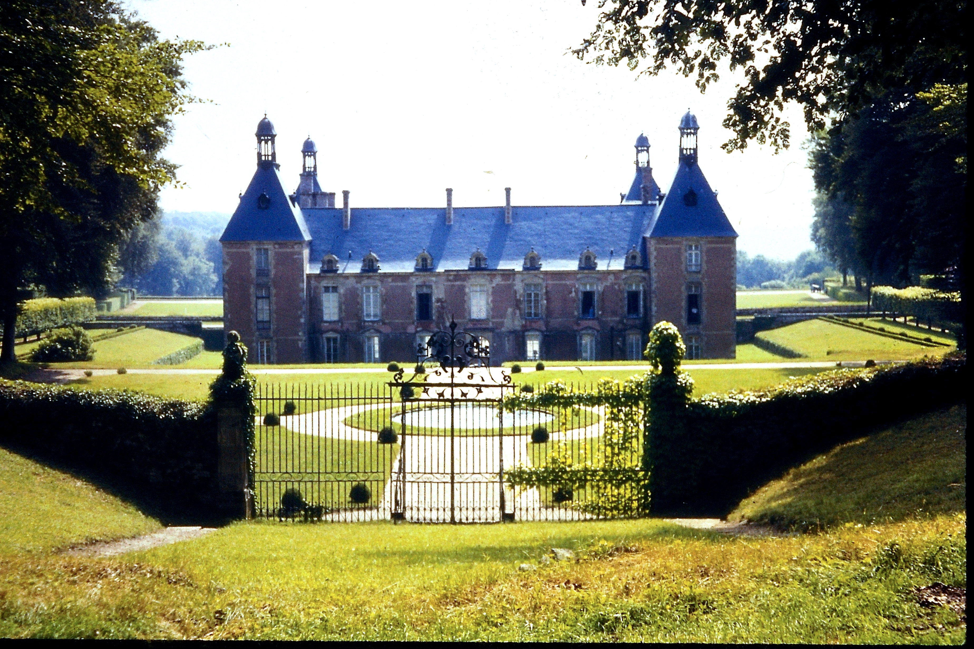 Chateau de Montjeu, Blick von Nordwest